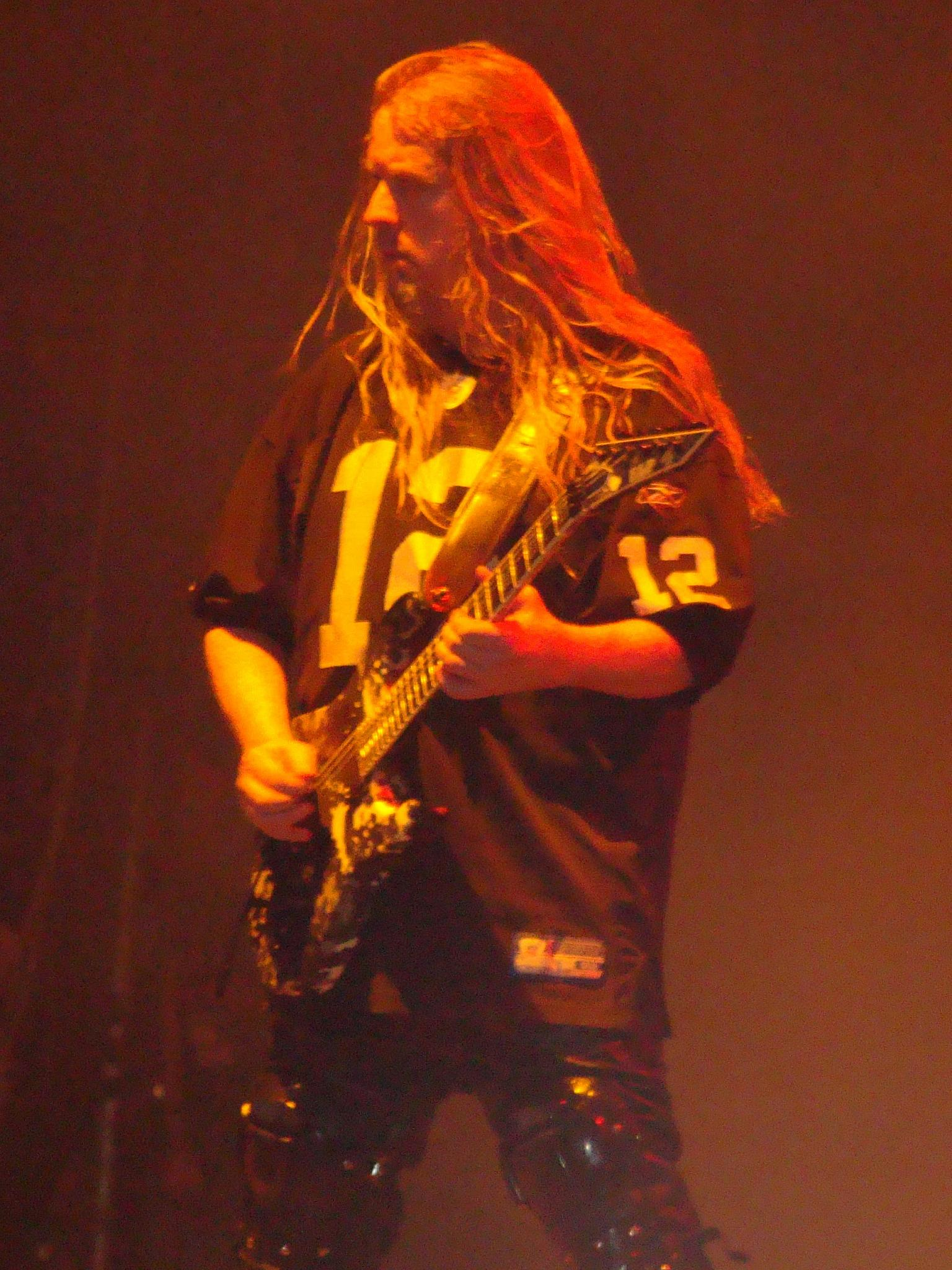 Slayer 05